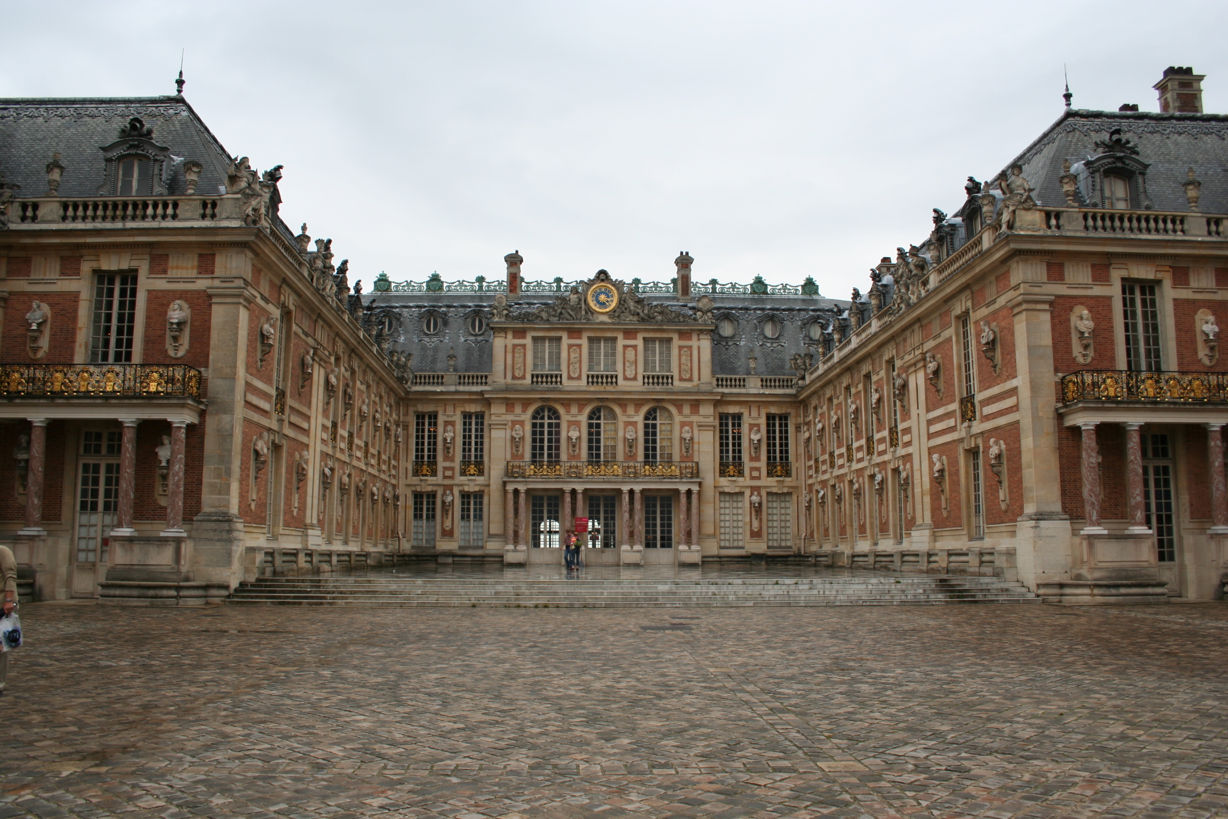 Una parte della facciata frontale del palazzo di Versailles